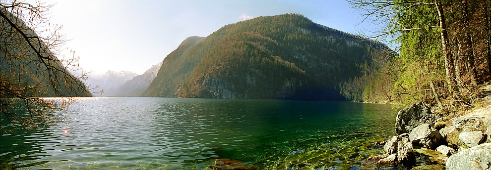 Panorama vom Königssee bei Berchtesgaden im Frühling Photograph: Florian Schott